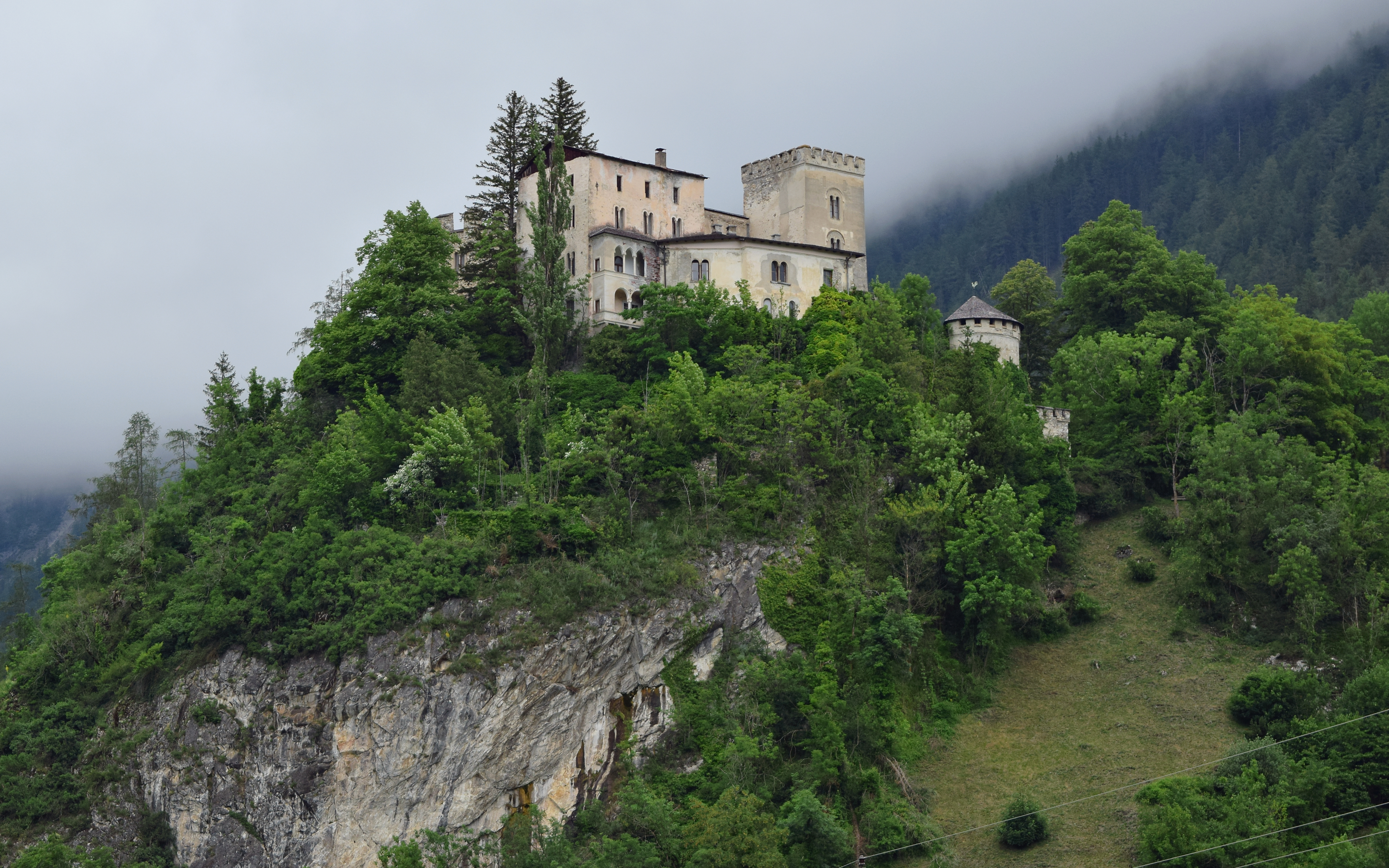 Schloss Weißenstein, die Berge dahinter vom Nebel verschluckt